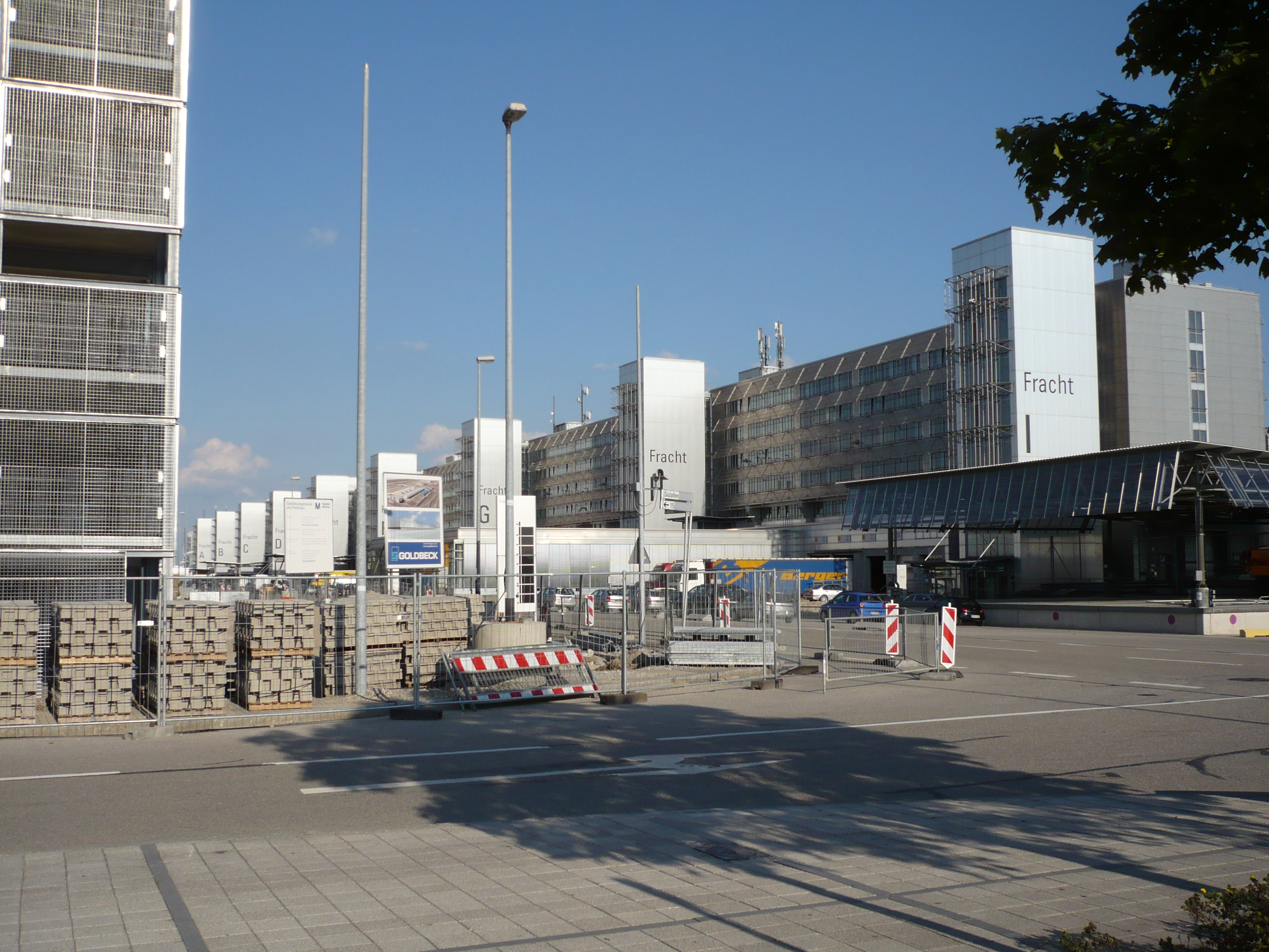 Frachtterminal des Flughafen Münchens